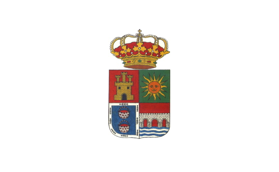 Bandera municipio de Vegas del Condado